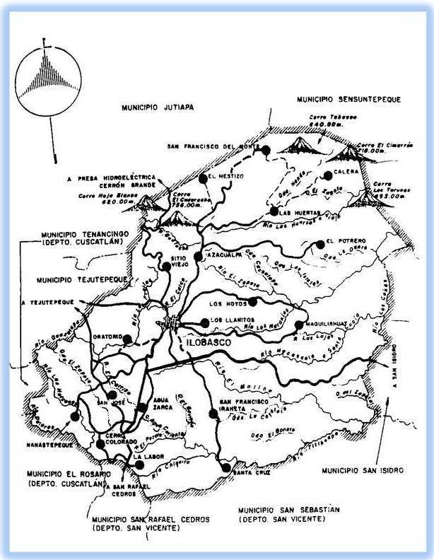 Mapa del municipio de Ilobasco